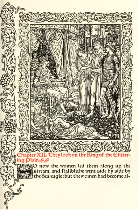 Page 77 du roman "The Story of the Glittering Plain" ("L'Histoire de la Plaine étincelante") de William Morris, dans la réédition chez Kelmscott Press en 1894, avec des illustrations par Walter Crane.